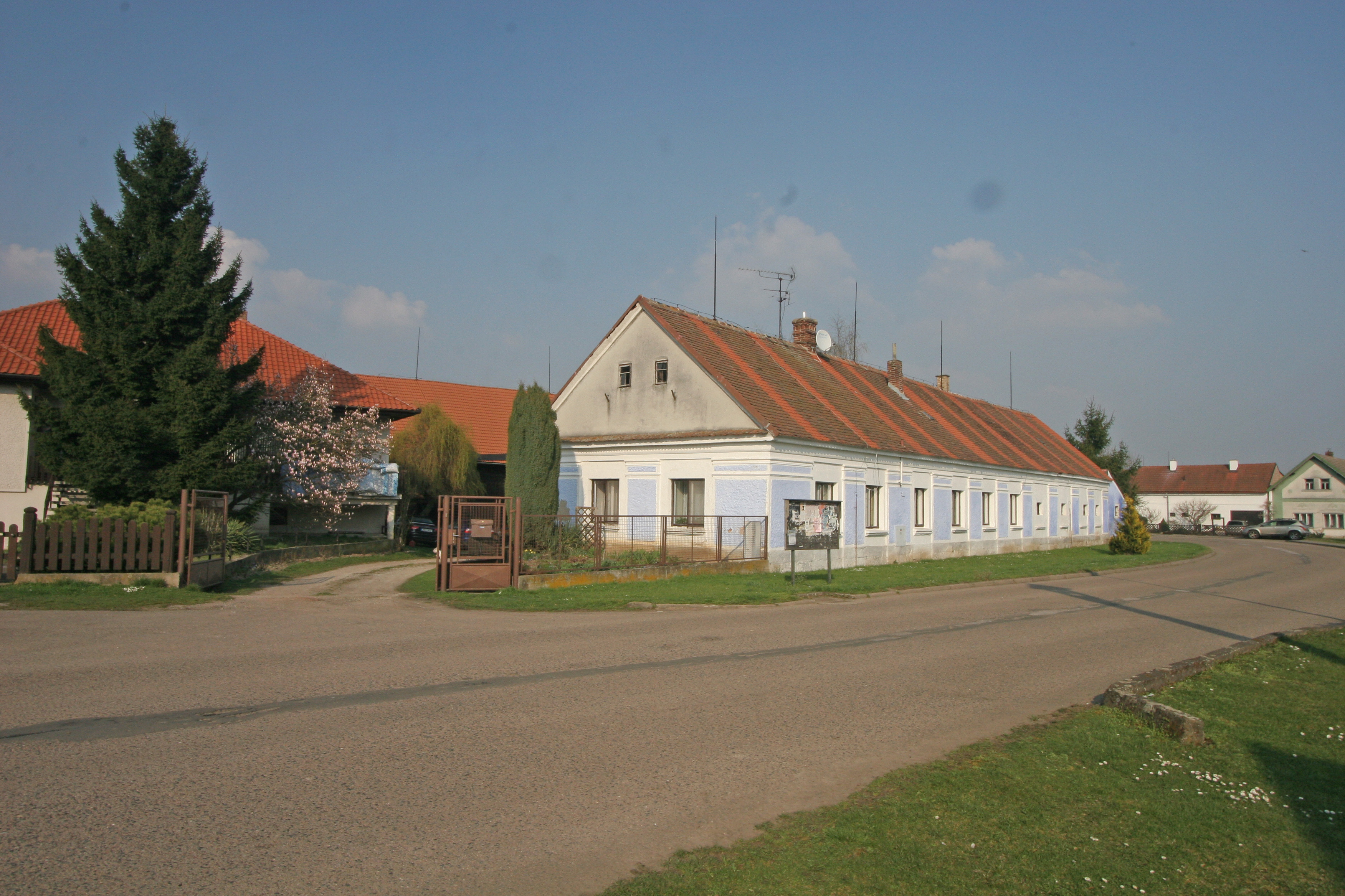 Pšánky čp. 1